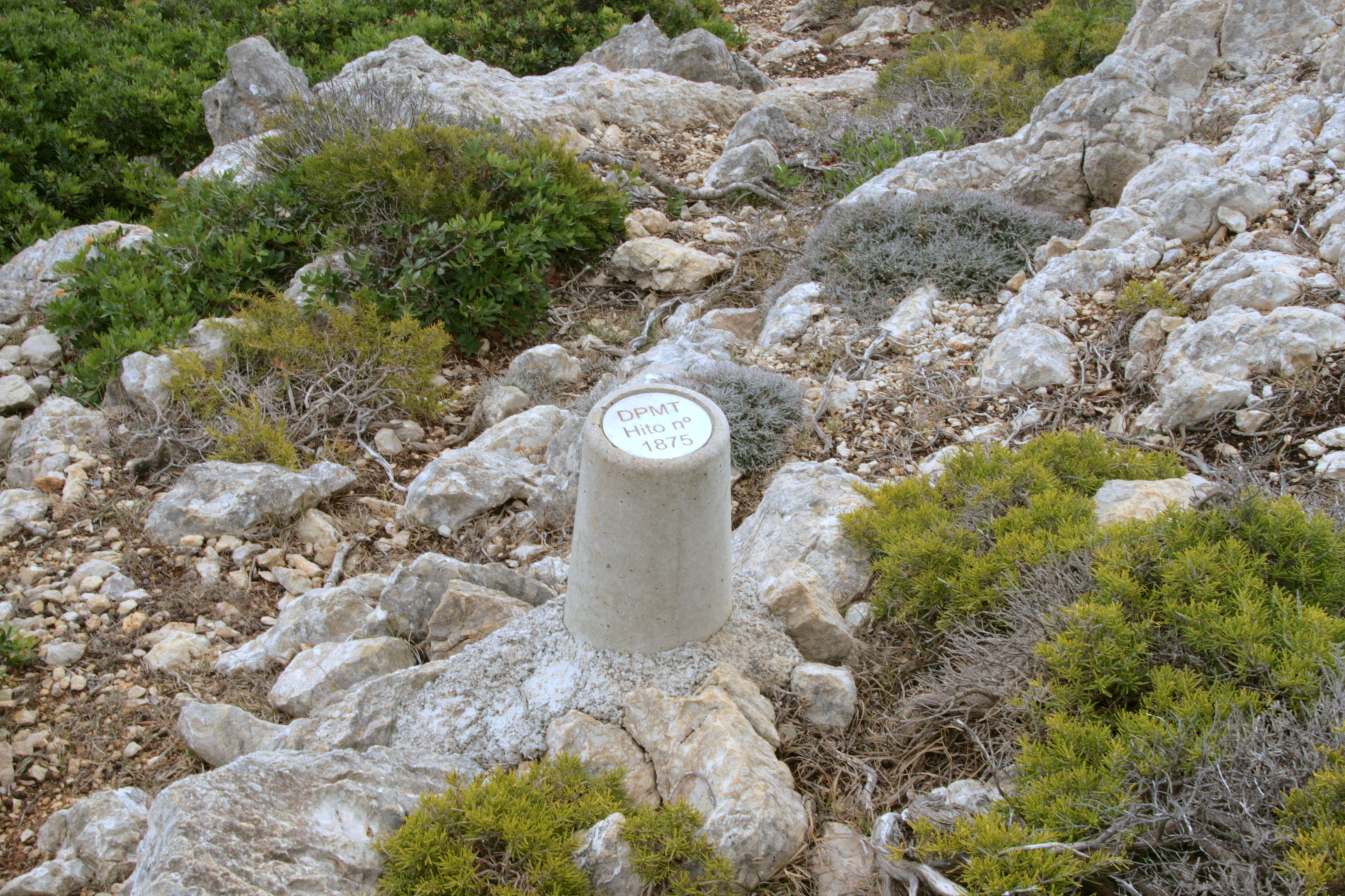 Hito de demarcación del Dominio Marítimo Terrestre junto al Camí de Cavalls This is a photography of a Special Area of Conservation in Spain with the ID: ES5310070. Natura2000 entry, EEA entry